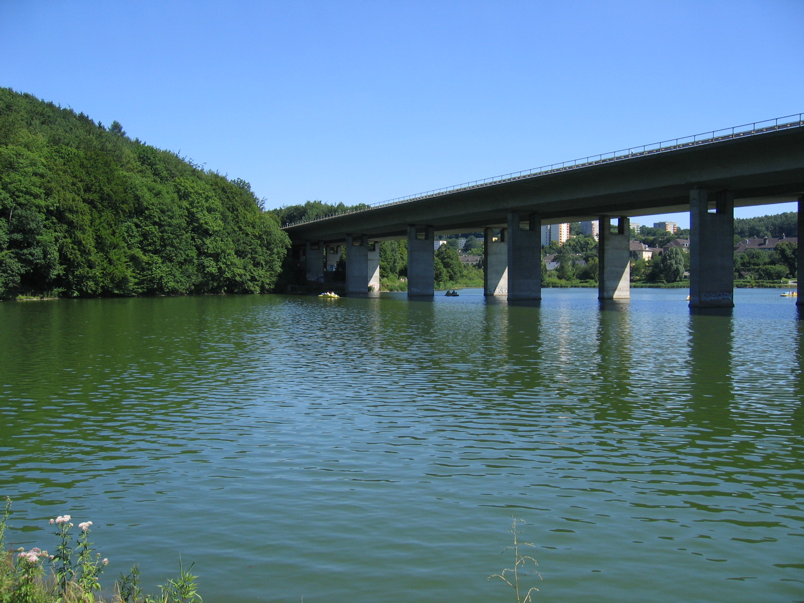 Die Brücke der A 46 über den Seilersee in Iserlohn (ca. 400 Meter) verbindet die Anschlussstelle Iserlohn-Seilersee (Nr. 48) und das vorläufige Ende der Autobahn in Iserlohn-Bilveringsen (Anschlussstelle Hemer Nr. 49). Verkehrsfreigabe für das Teilstück erfolgte im Mai 1976.